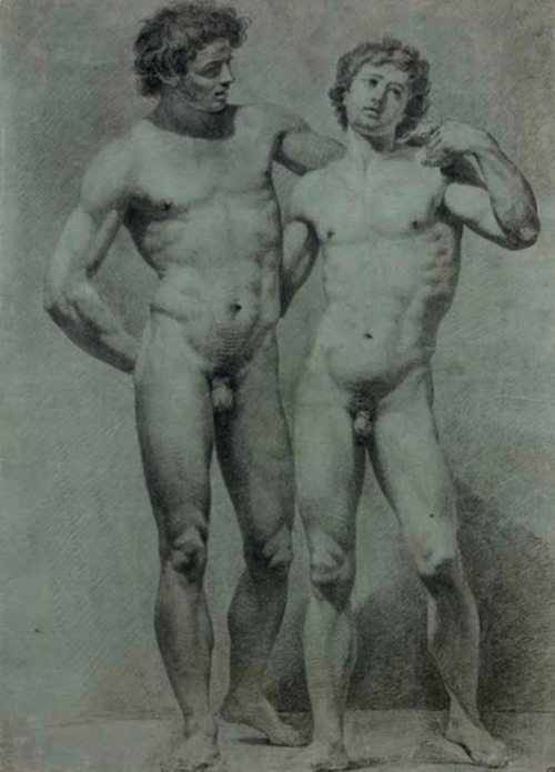 Jean-Claude Naigeon, dessin.